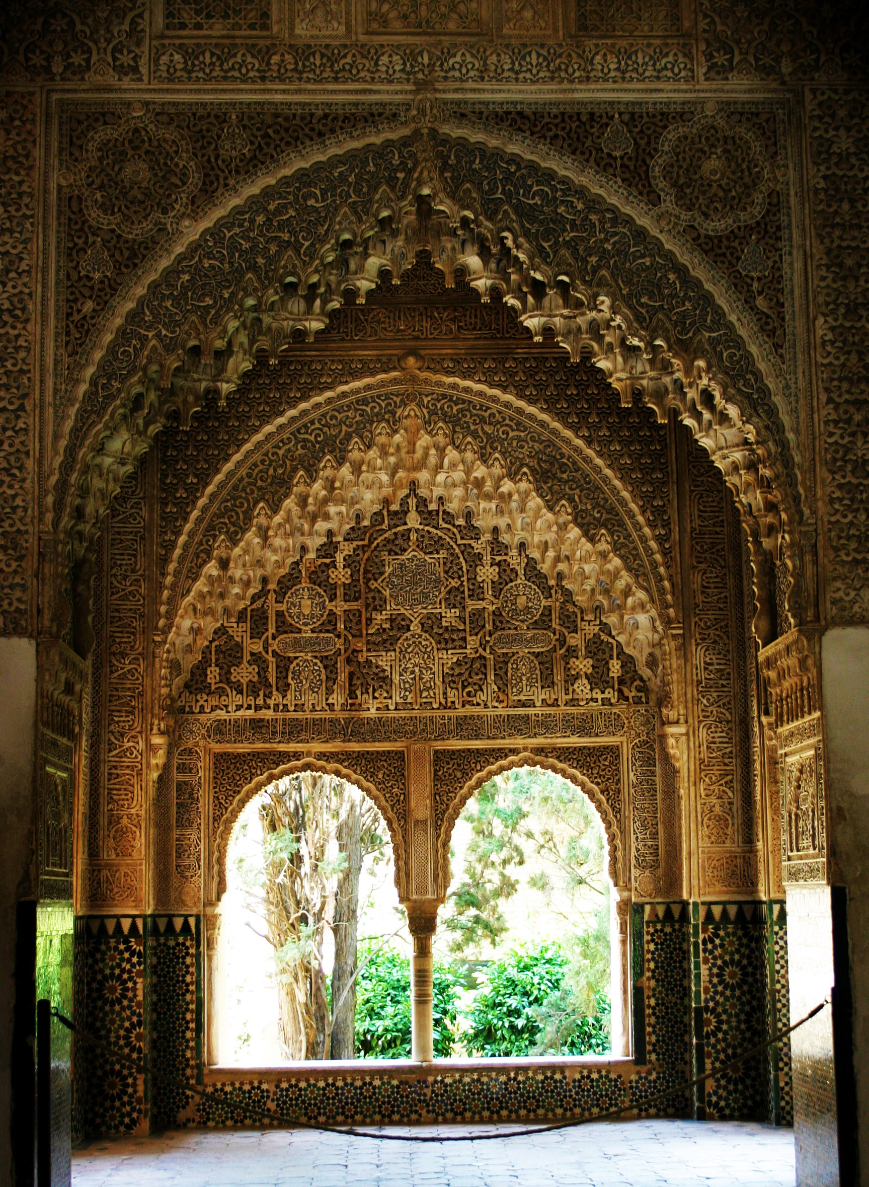 Alhambra, Granada, Spanyolország